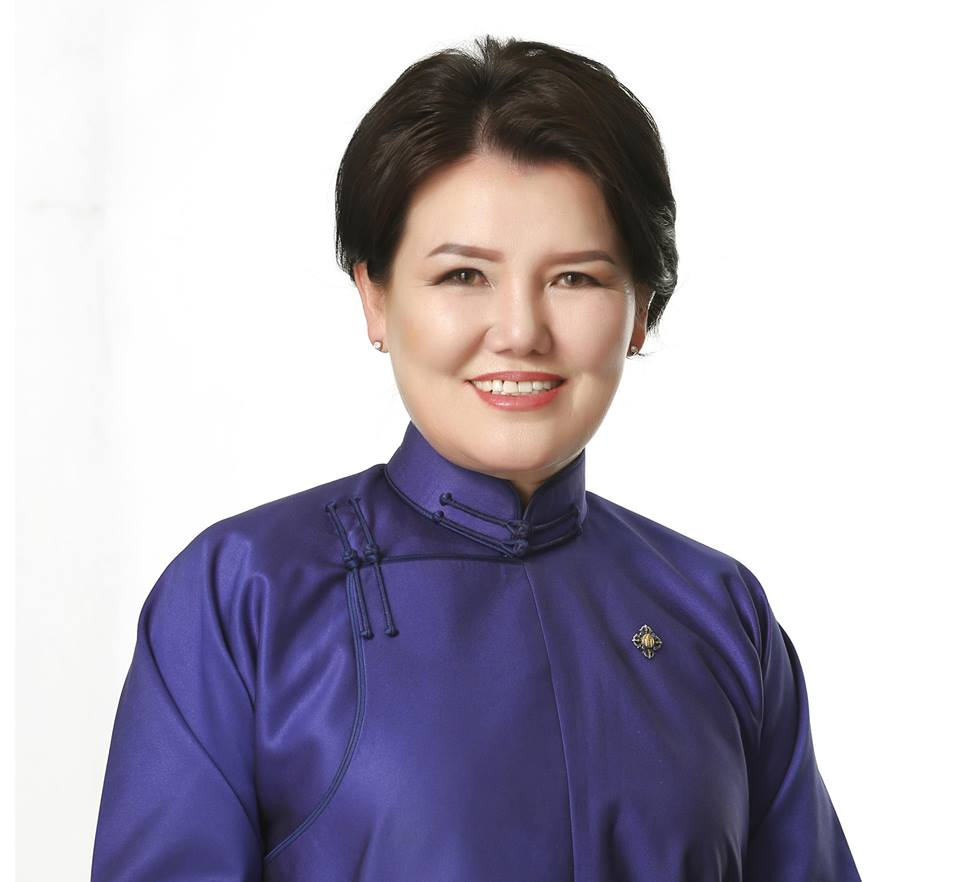 Монгол: Улсын Их Хурлын гишүүн